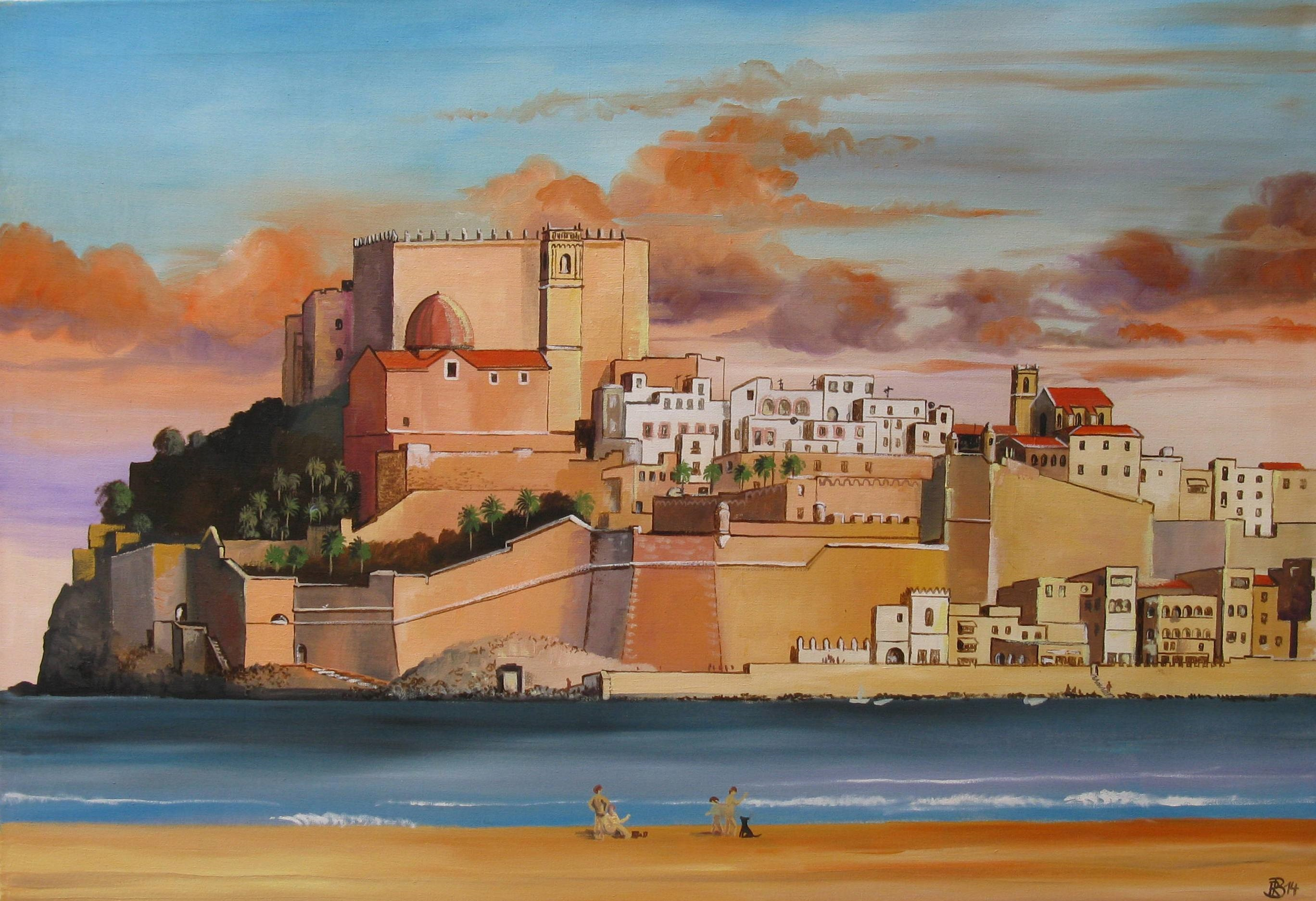 Reinhard Bergmann: Burg Peñíscola in Castellón, 2014, Öl/Leinwand, 100x70 cm, aus der Serie „Stätten der Templer“